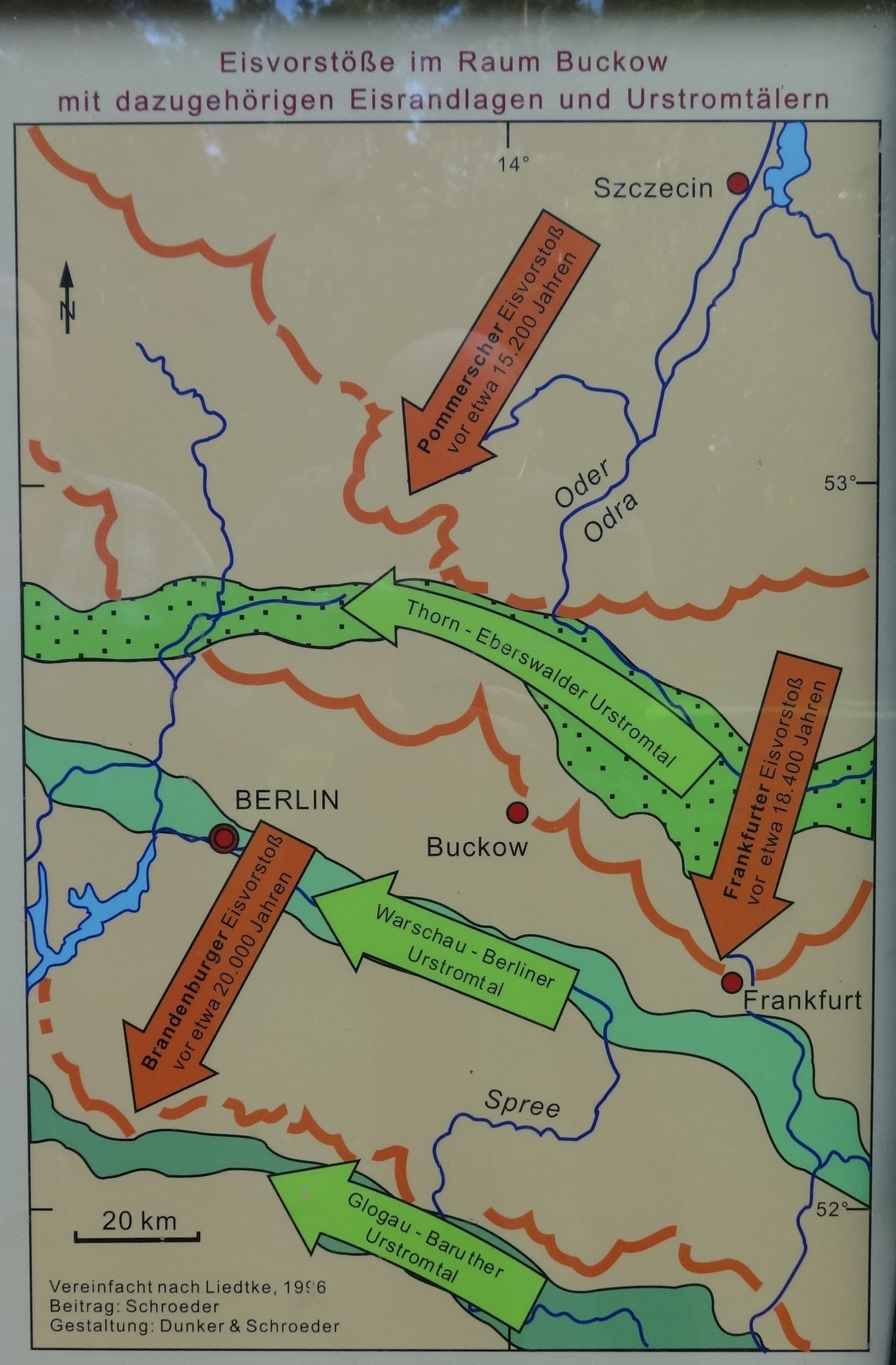 Eiszeitgarten Buckow (Märkische Schweiz) - eine gärtnerische Darstellung der eiszeitlich geprägten Landschaft um Buckow, gelegen im Lunapark an der Buckowseepromenade in Buckow Die Eisvorstöße wurden auf einer der öffentlich zugänglichen Tafeln abfotografiert.